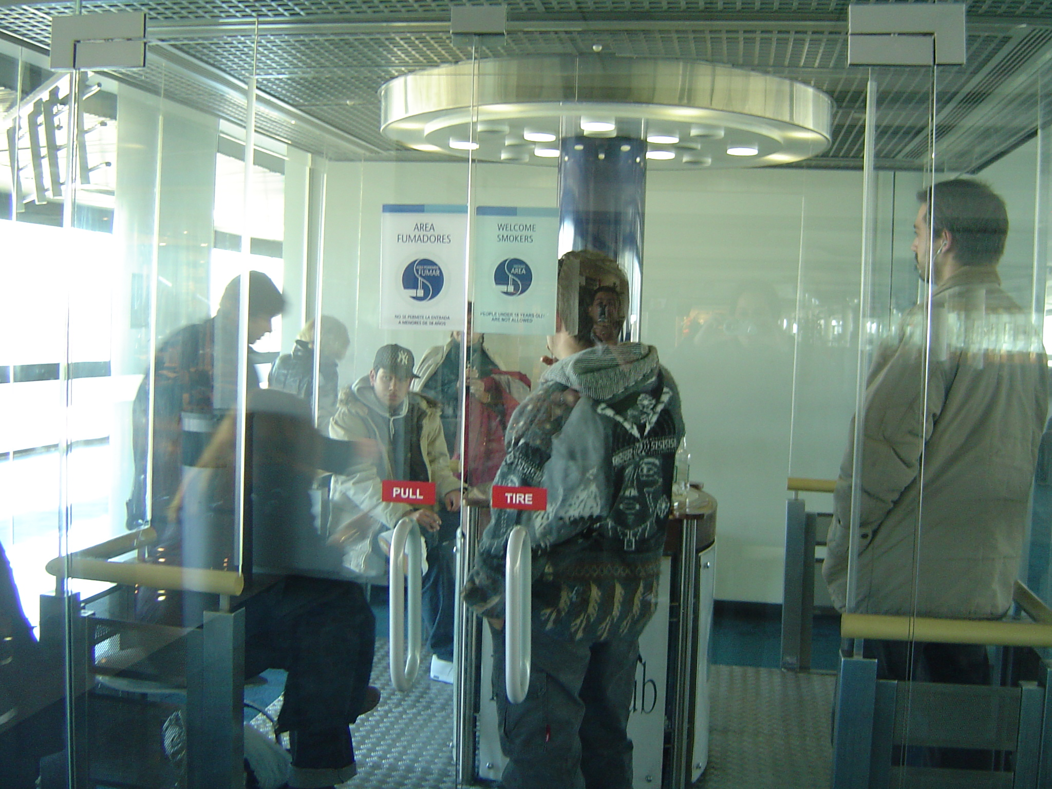 Asi es el lugar donde se puede fumar dentro del aeropuerto chileno.